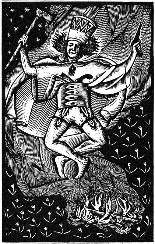 Zbójnicki, wood engraving, Muzeum Żup Krakowskich w Wieliczce